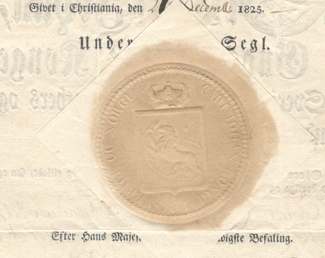 Papiroblat med riksvåpenet i Karl Johans norske segl 21 12 1825